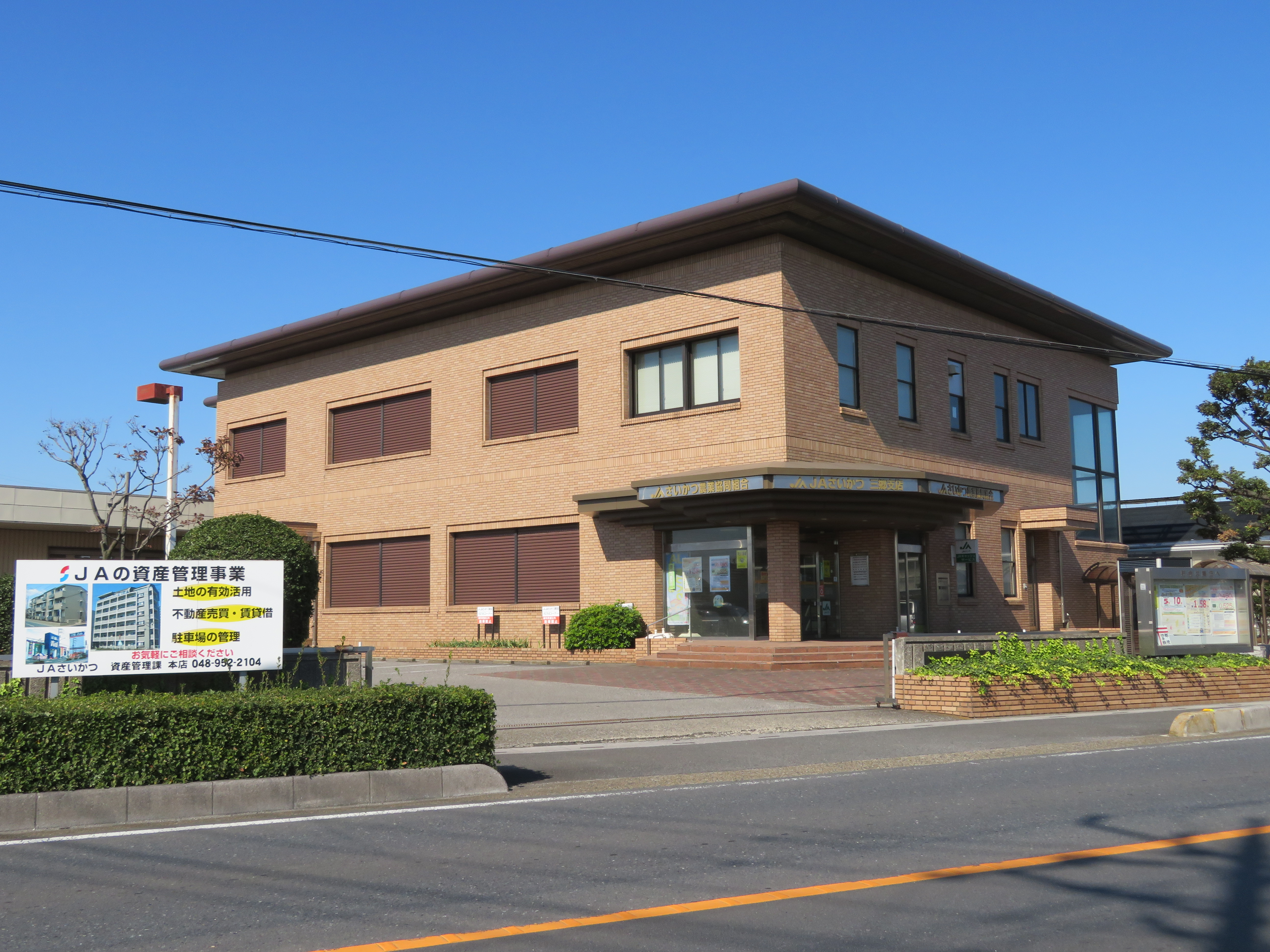 さいかつ農業協同組合本店・三郷支店 Canon PowerShot SX720 HS